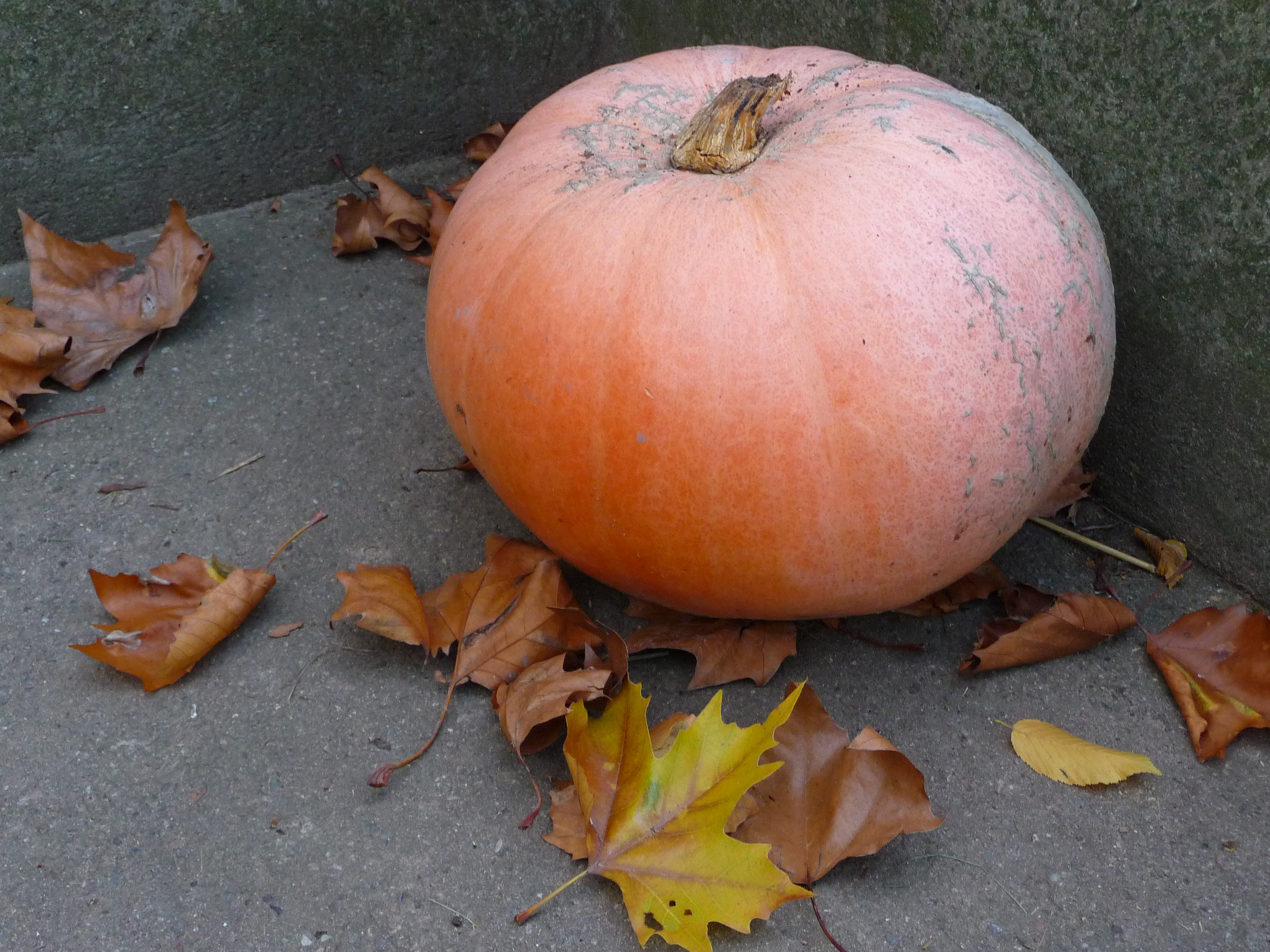 Riesenkürbis (Cucurbita maxima)